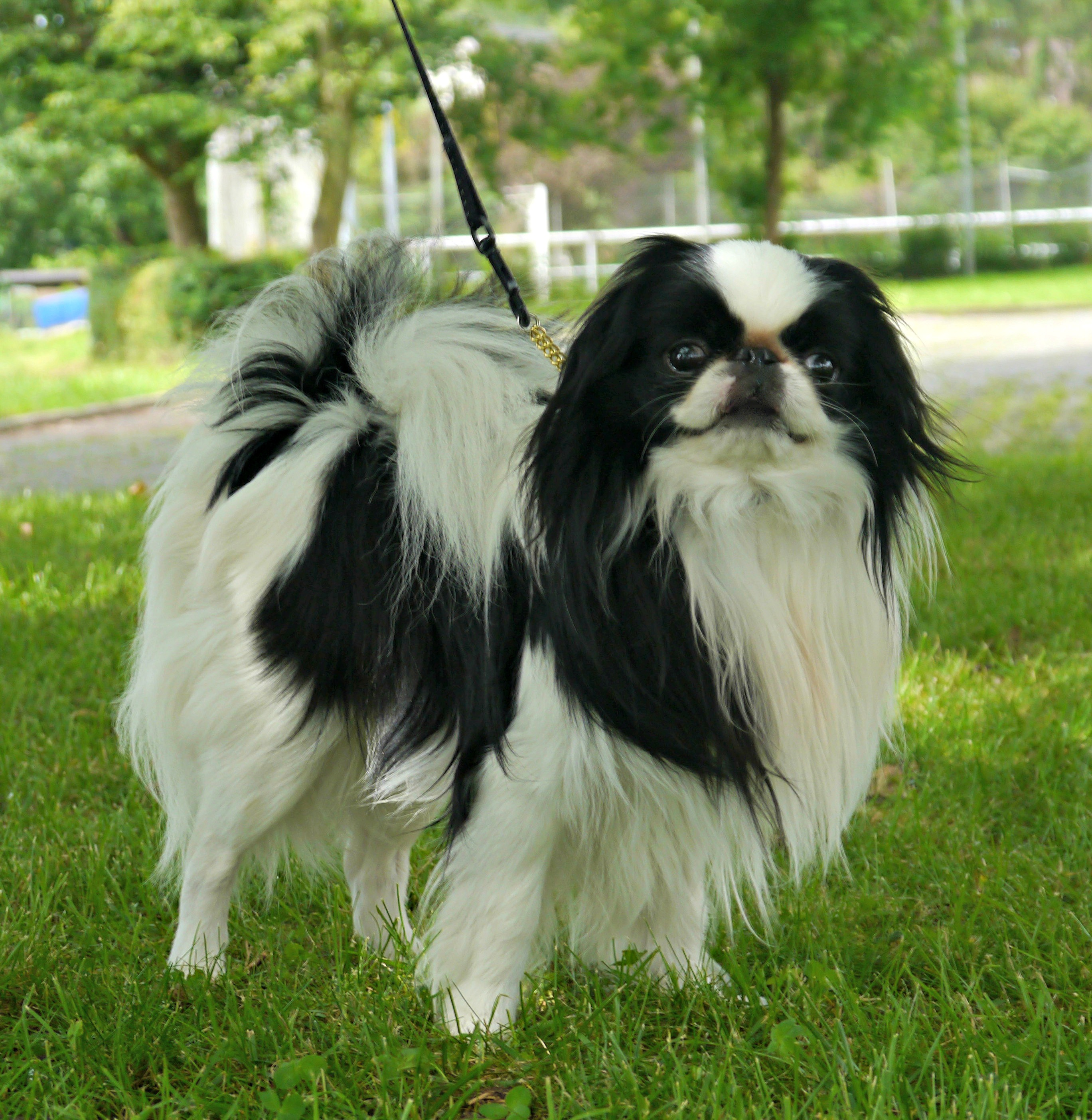 Japan Chin - Simsalachin El Manolito